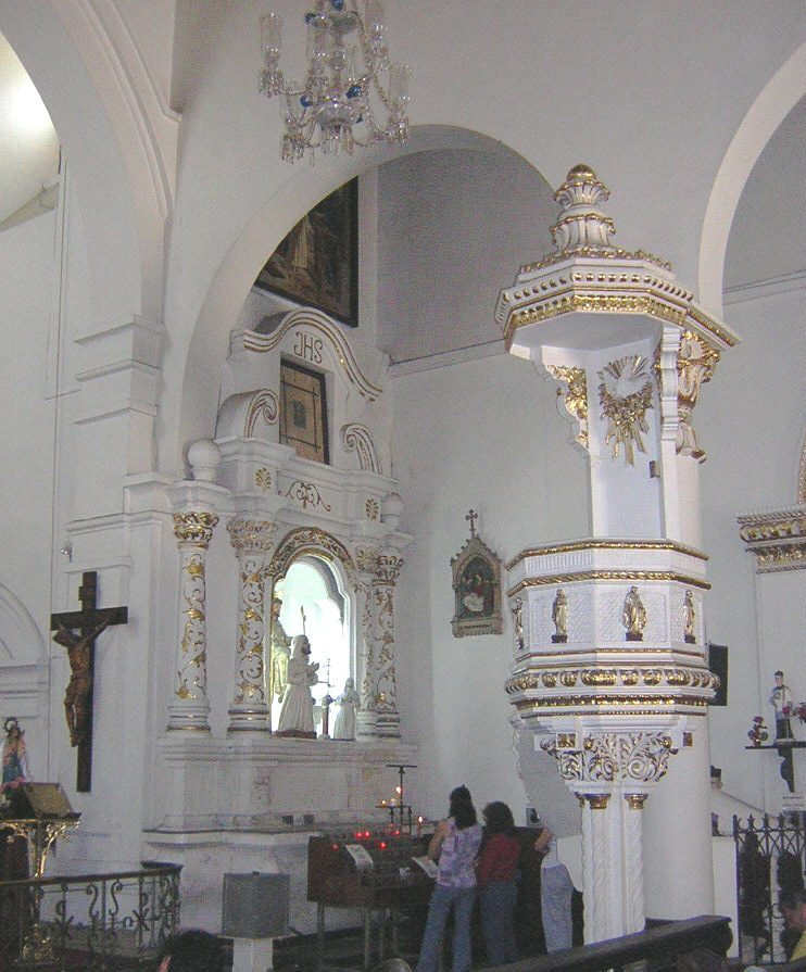 Púlpito de la Iglesia La Veracruz, Medellín, Colombia